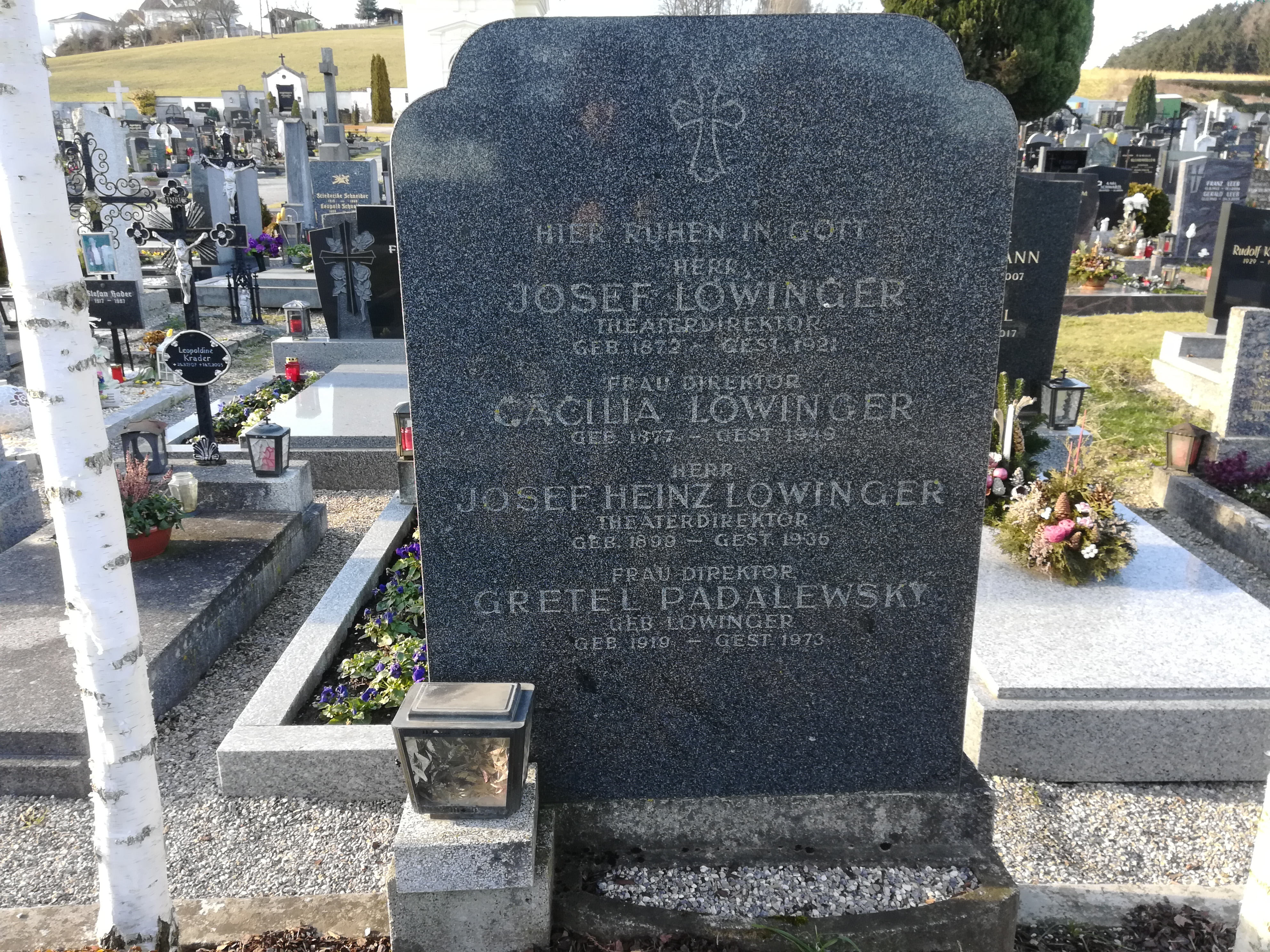 Grabstein der Familie Löwinger auf dem Friedhof in Ybbs an der Donau